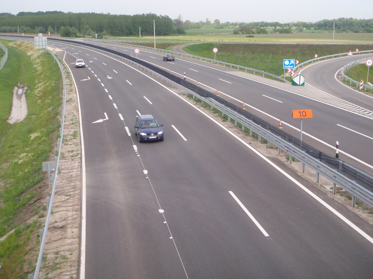 M85 Enese mellett Sopron felé